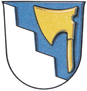 Wappen Biburg